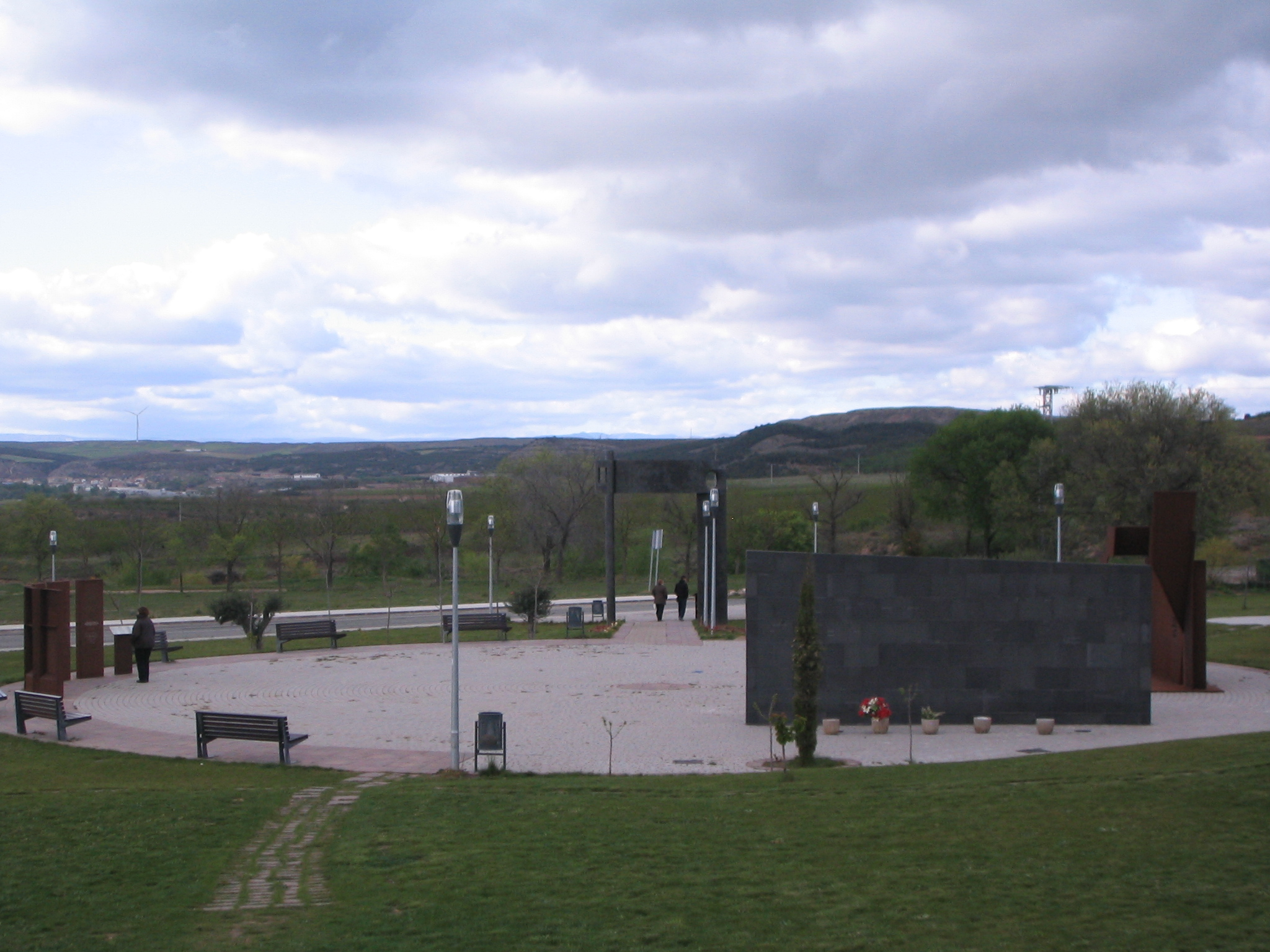 Sartaguda, Navarra (España). Parque de la memoria.